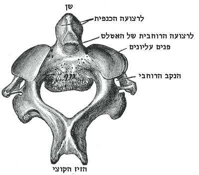 חולית הציר